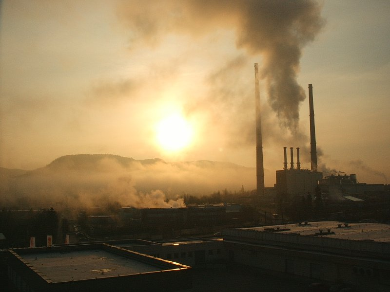 Heizkraftwerk Jena-Süd